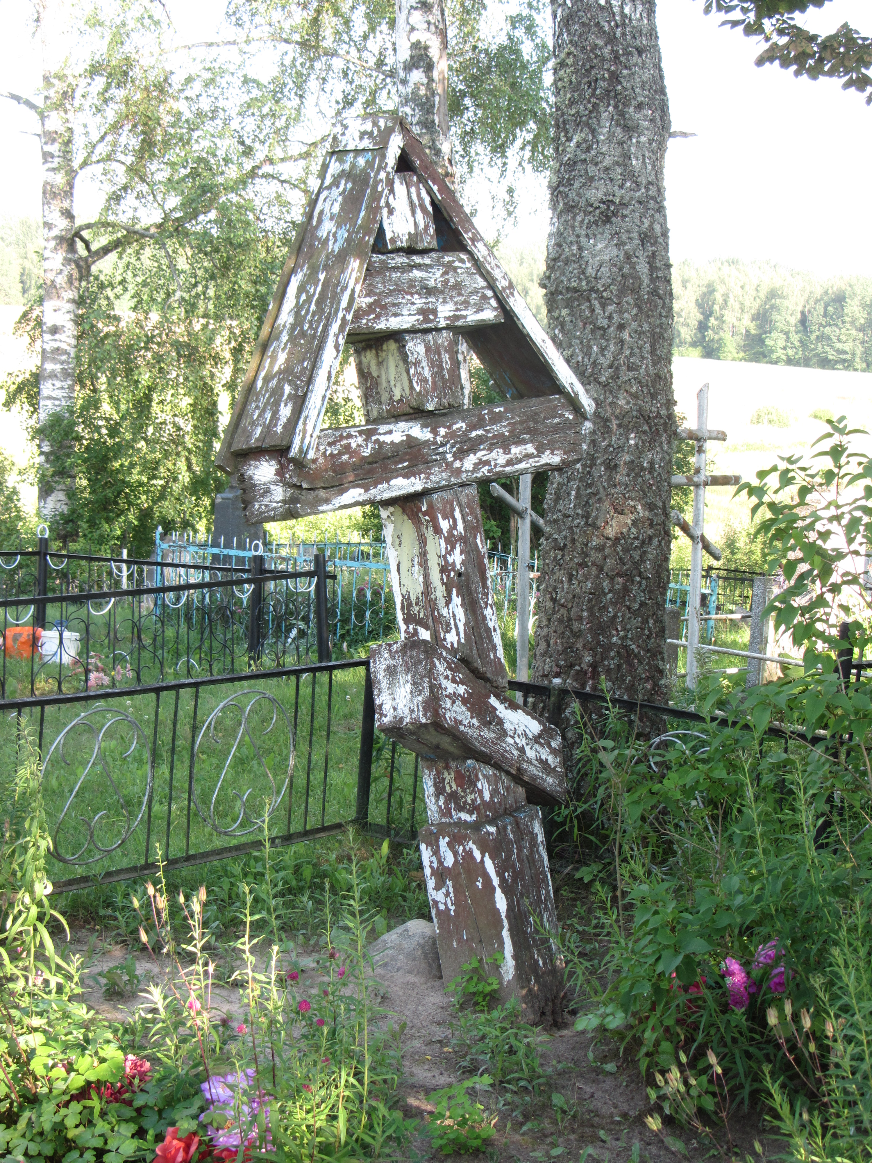 Svirkų sen., Lithuania